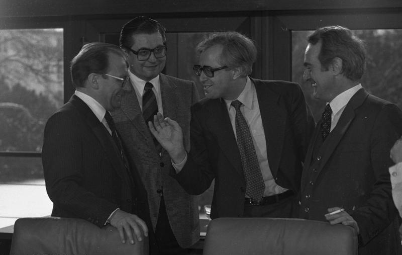 Bundeskanzler Helmut Schmidt empfängt die Ministerpräsidenten der Länder im Bundeskanzler Amt.